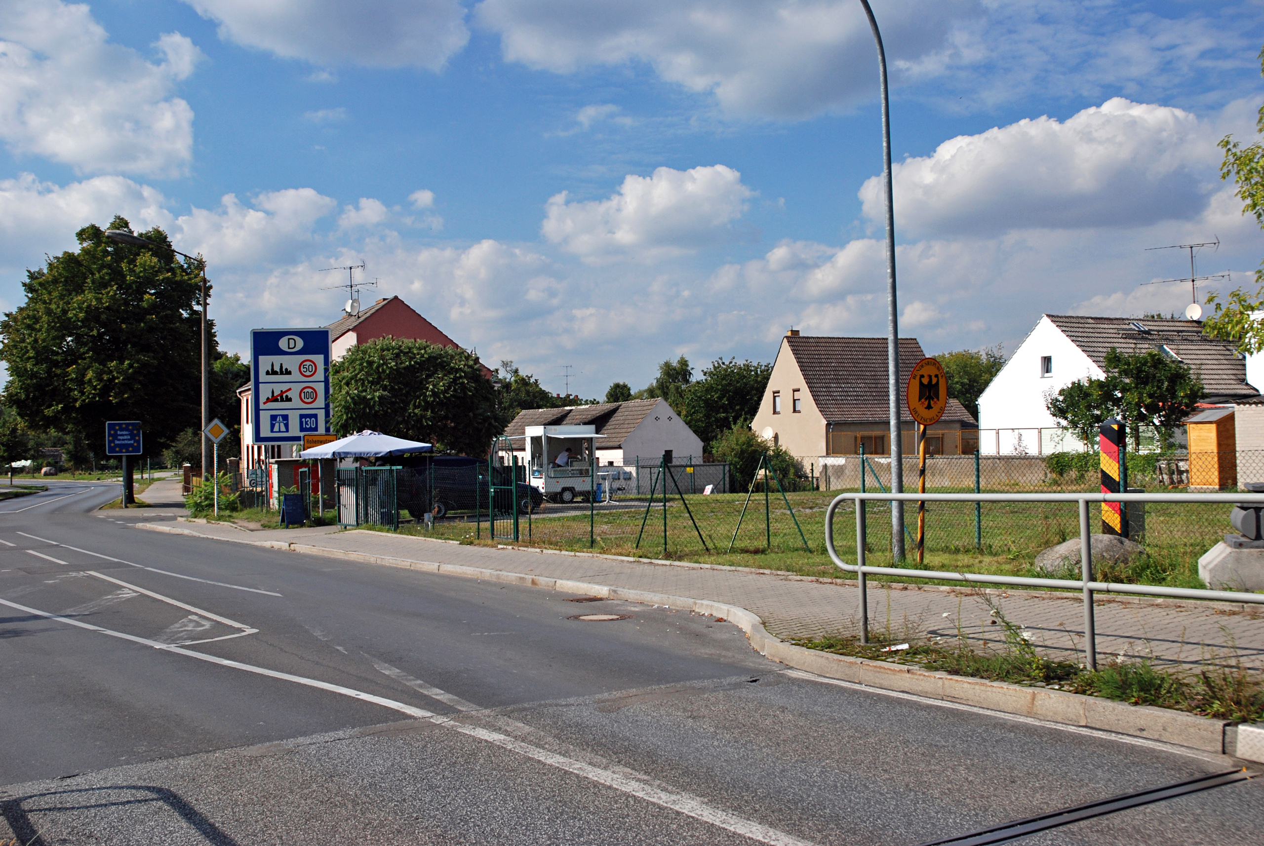 Grenze Polen-Deutschland in Hohenwutzen am Rand der Neuenhagener Insel, OT von Bad Freienwalde, Lamdkreis Märkisch Oderland, Land Brandenburg